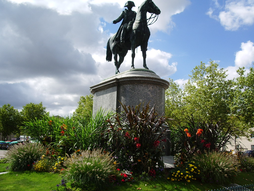 Émilien de Nieuwerkerke: Statue équestre de Napoléon Ier, Place Napoléon, La Roche-sur-Yon, France